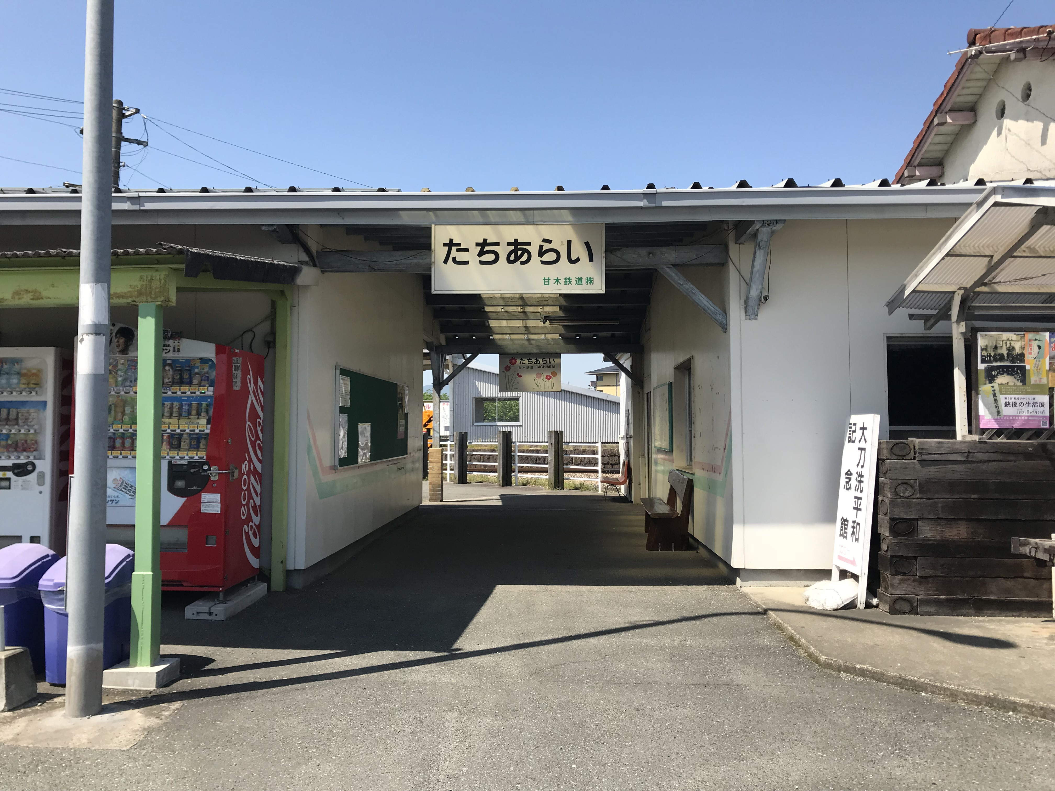 太刀洗駅の入り口